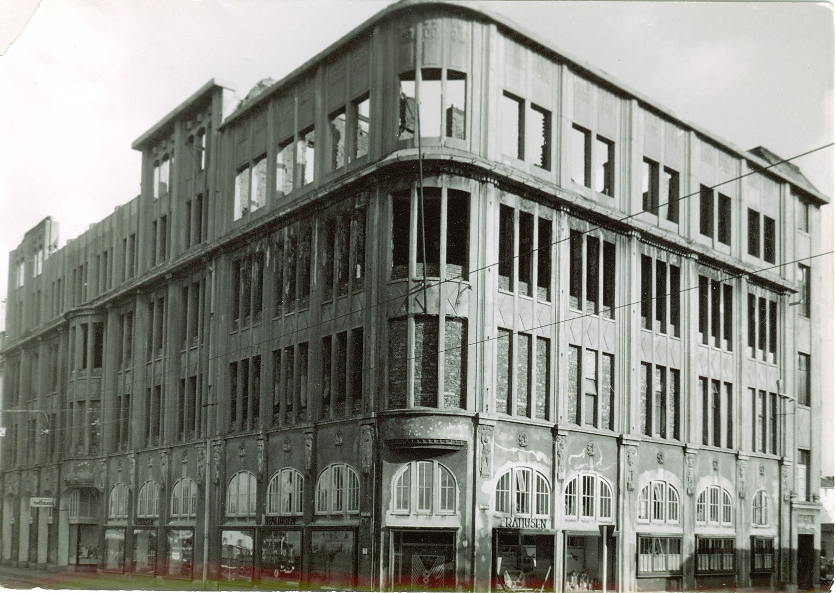 Ausgebranntes Möbelhaus von Heinrich Julius Frey (früher Siegmund Oss) an der Kaistraße in Geestemünde